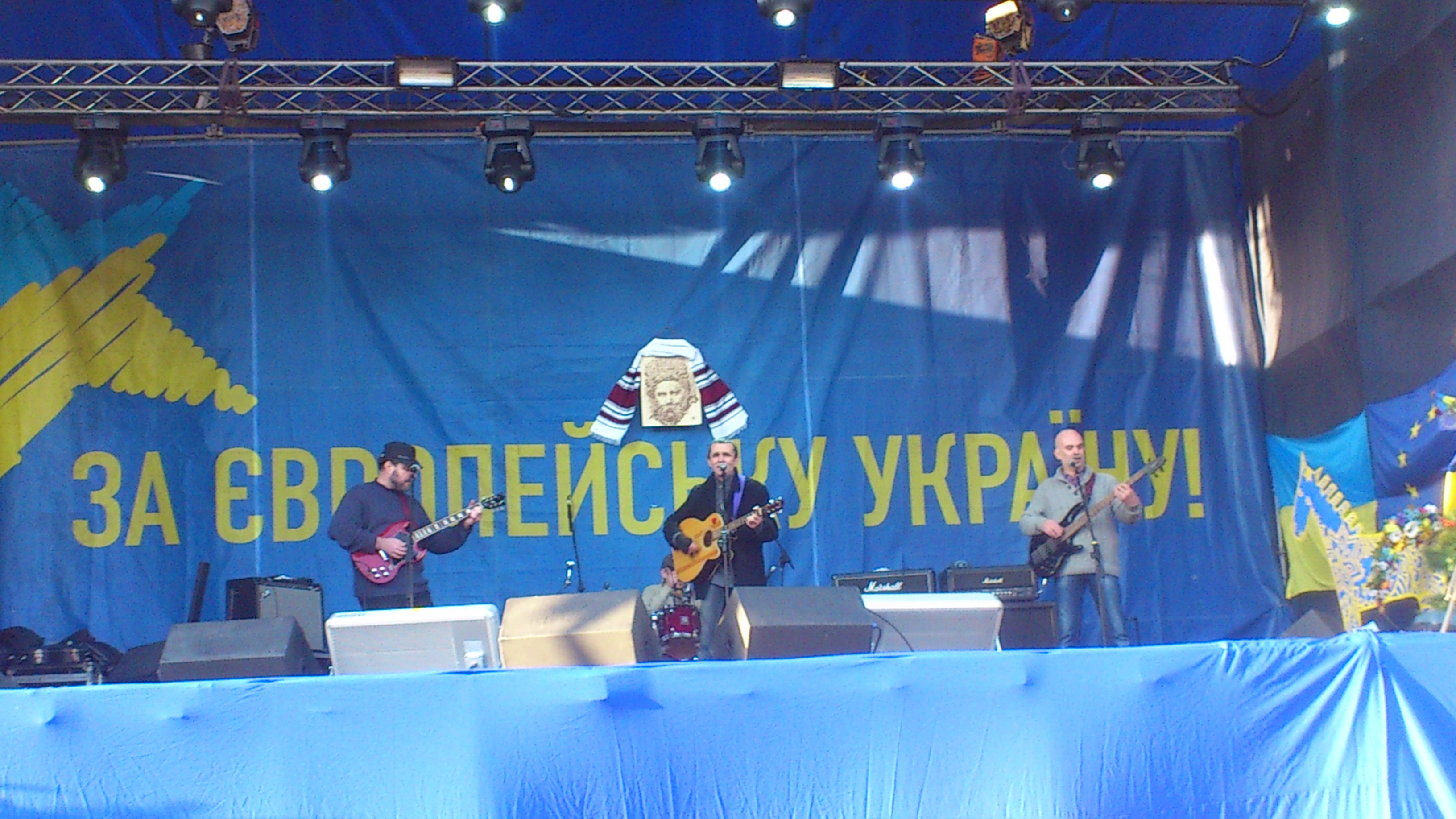 Рутенія на Євромайдані 29 грудня 2013